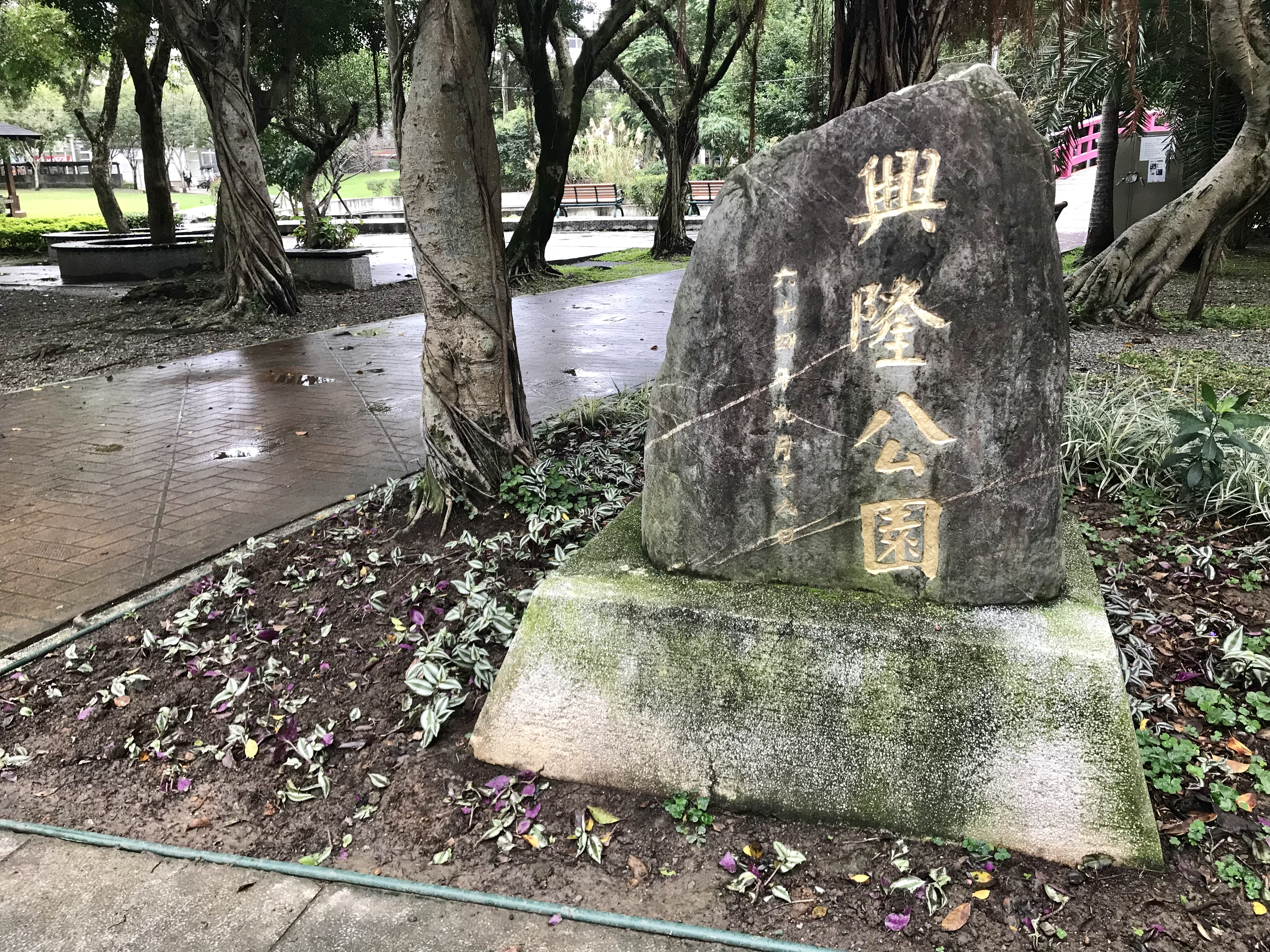 臺北市文山區興隆公園園名石碑，於1975年公園成立時所立